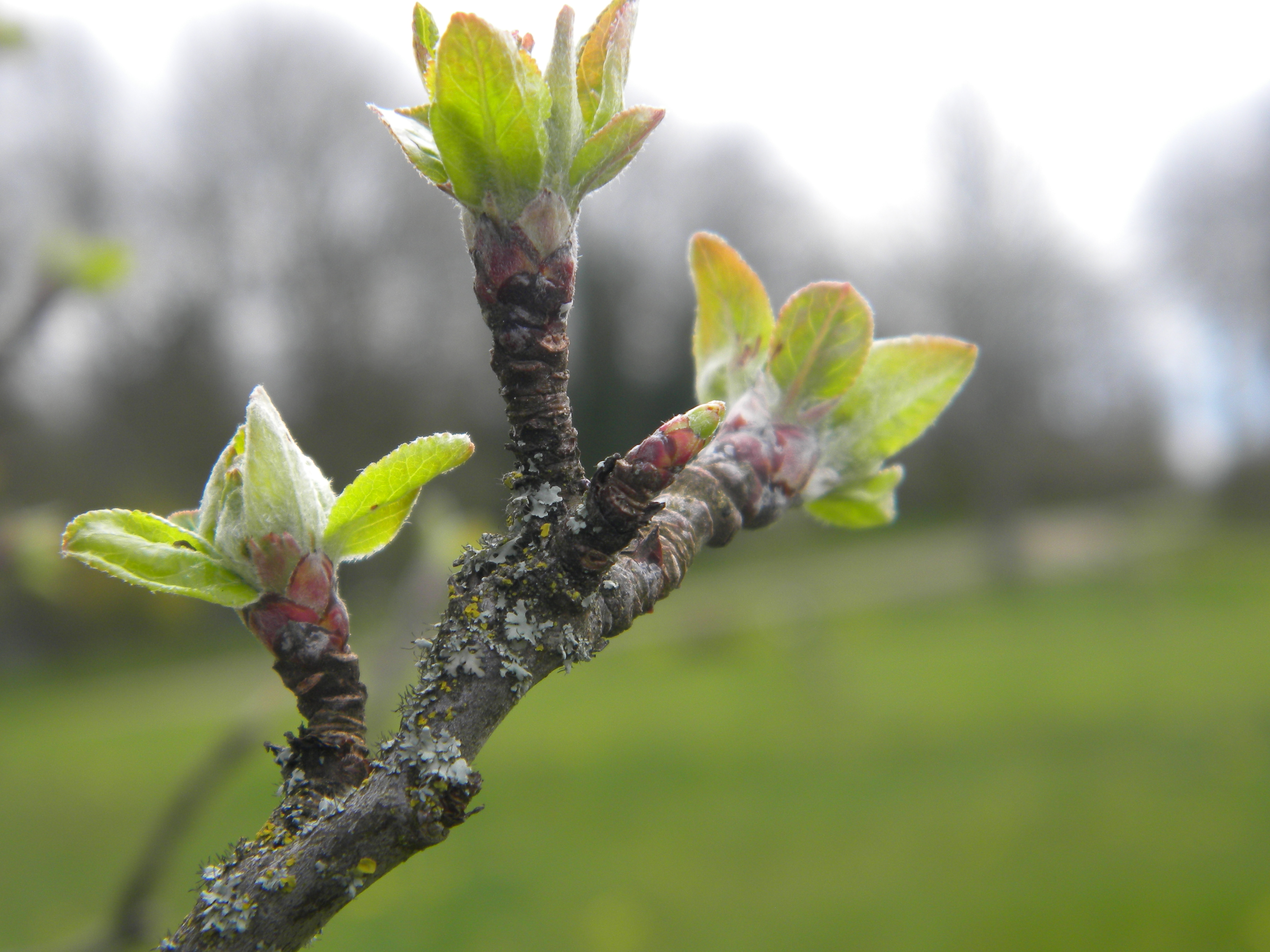 Pomo en Civry-en-Montagne